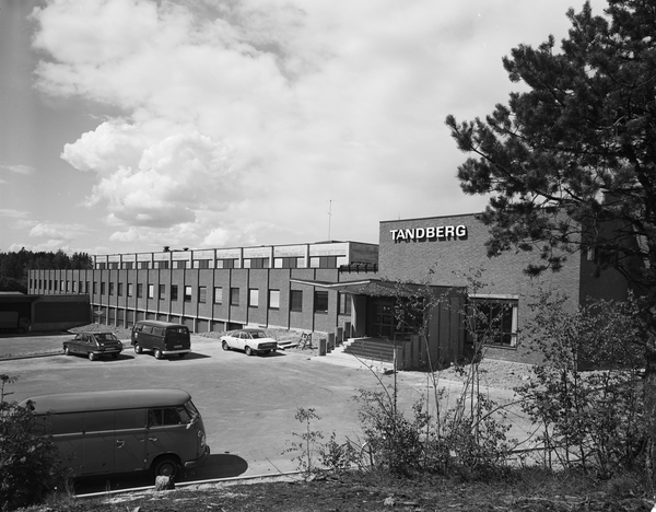 Tandbergs radiofabrikk, biler.